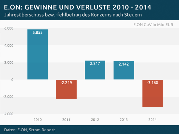 E.ON Gewinne und Verluste 2010 – 2014 , Jahresüberschuss bzw. -fehlbetrag des Konzerns nach Steuern